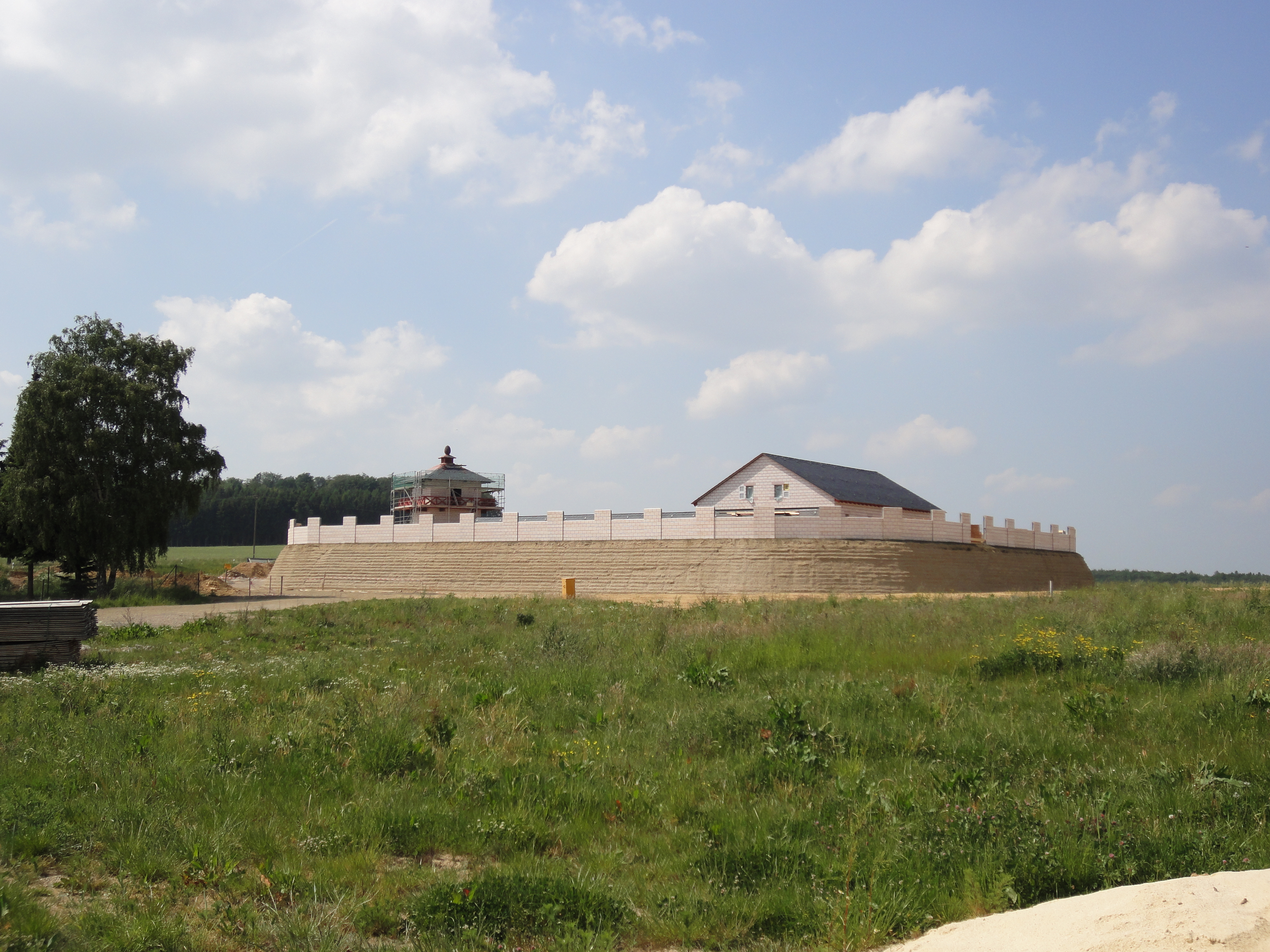 Nachbau des Kleinkastells Pohl am Limes